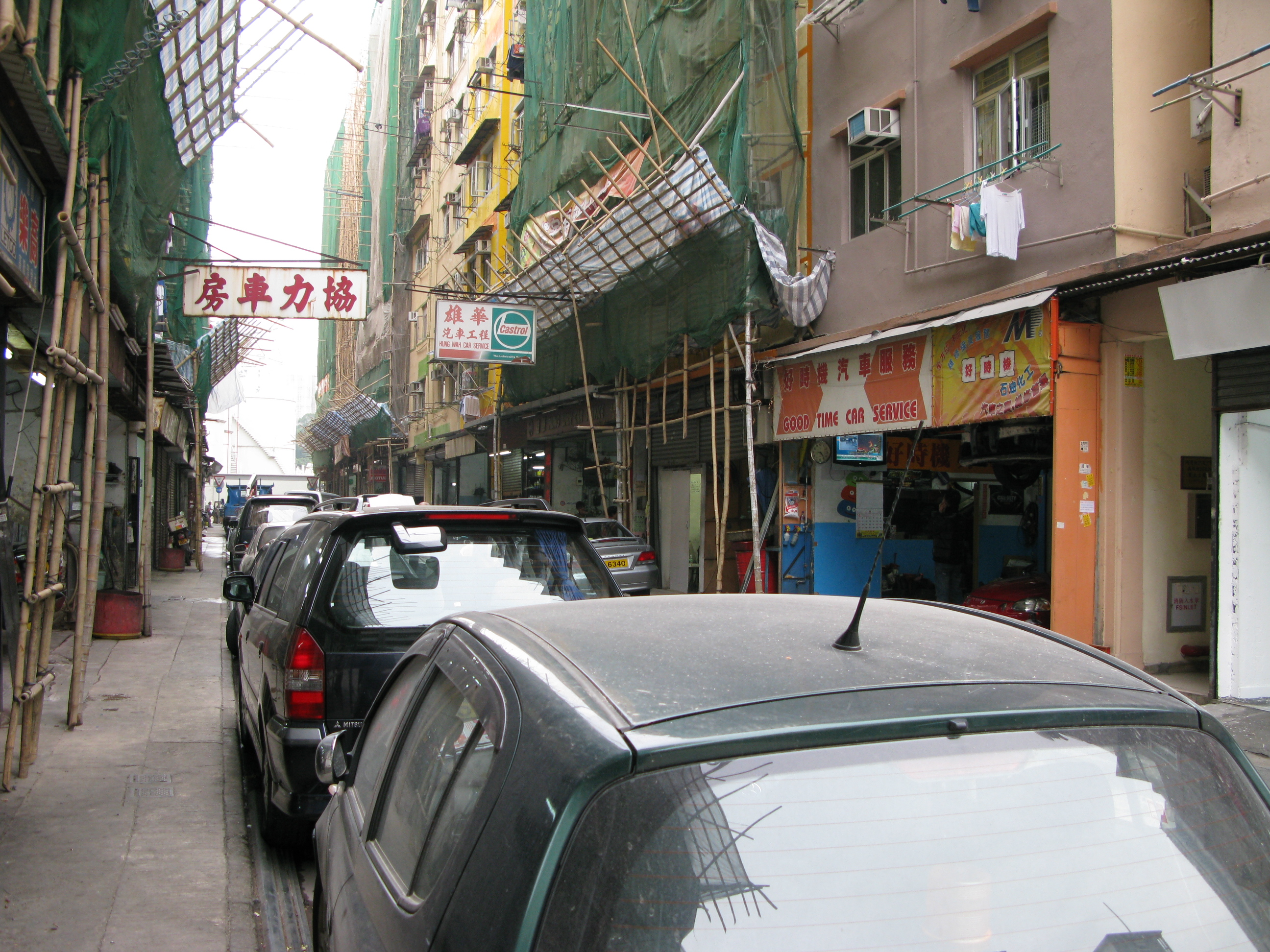 中文（香港）: 香港九龍土瓜灣十三街蟬聯街